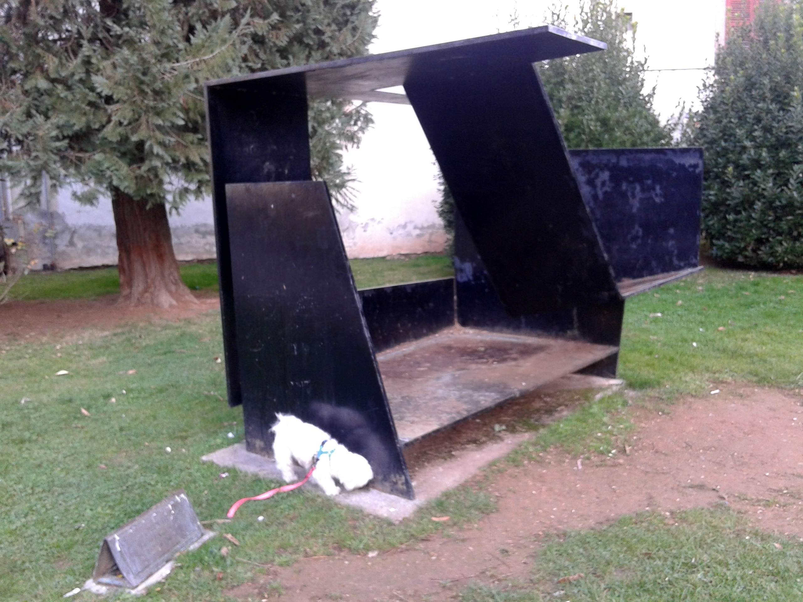 Jorge Oteizaren eskultura Elizondon.